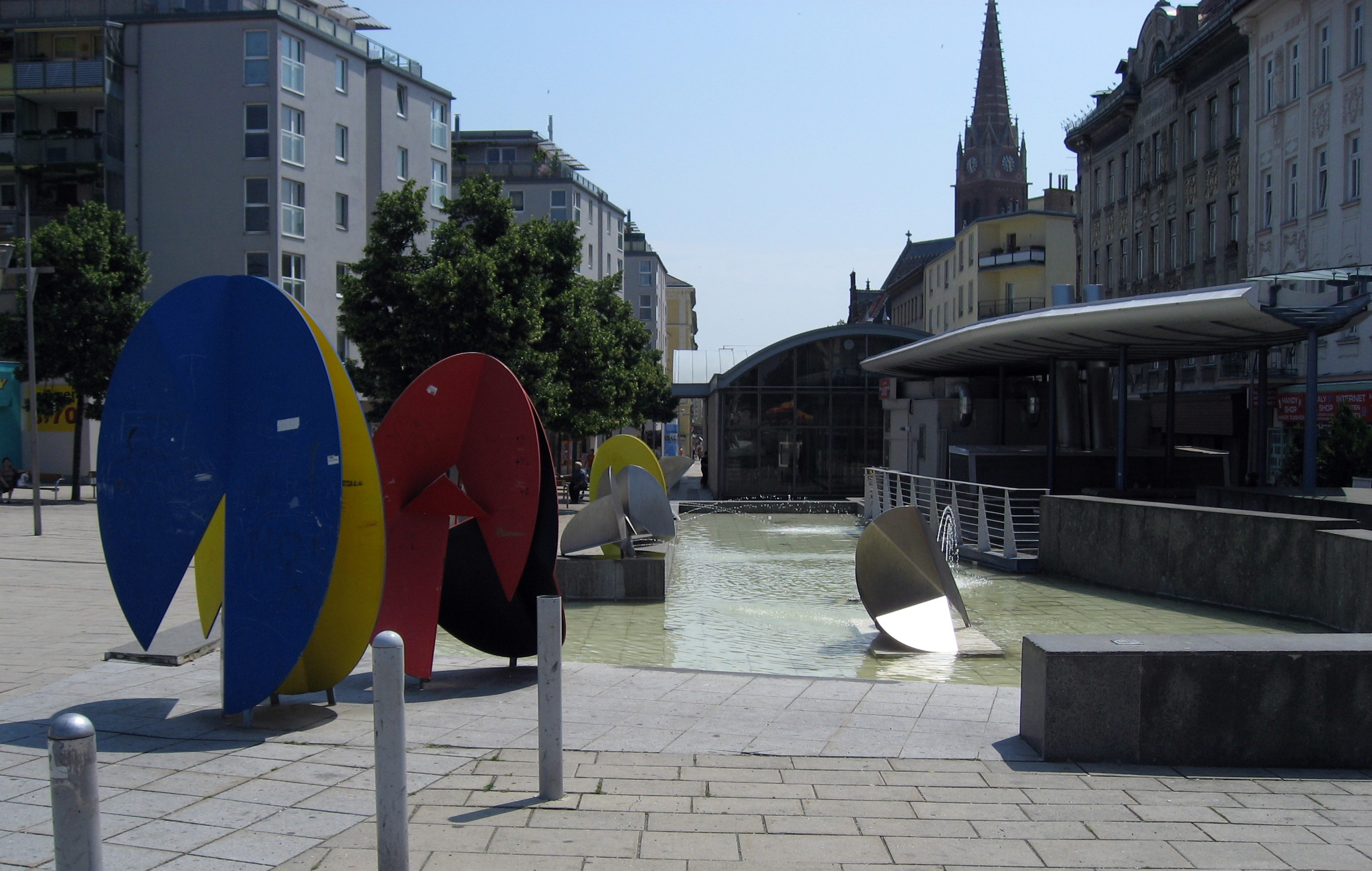 Wiener Wasserwelt, Stahlfiguren "Neun Doppel-Ellipsen" von Waltrud Viehböck